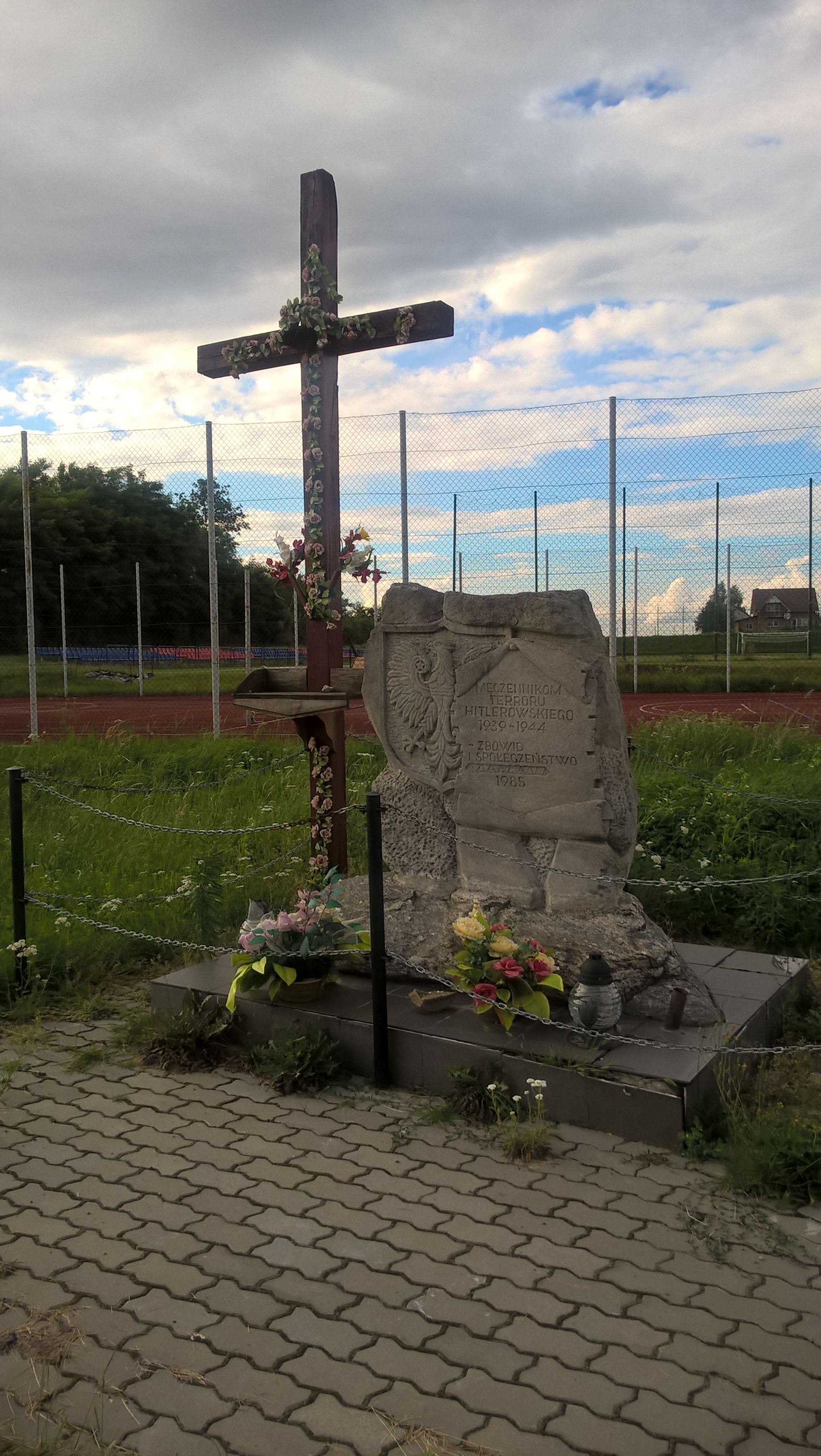 Pomnik pamięci ofiar II wojny światowej w Różańcu